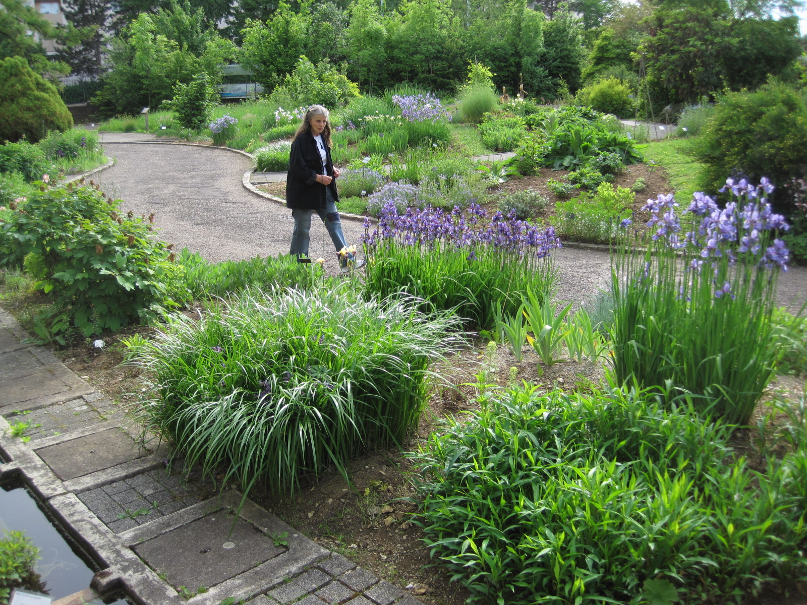 Jardin botanique de Besançon